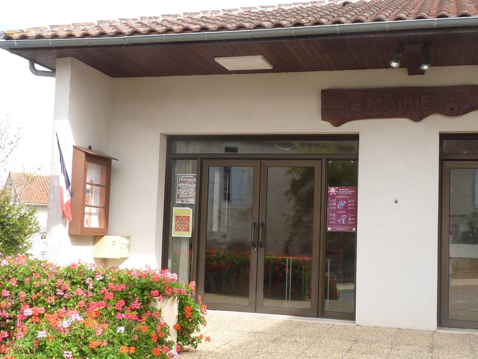 mairie de Bertric-Burée, Dordogne, France